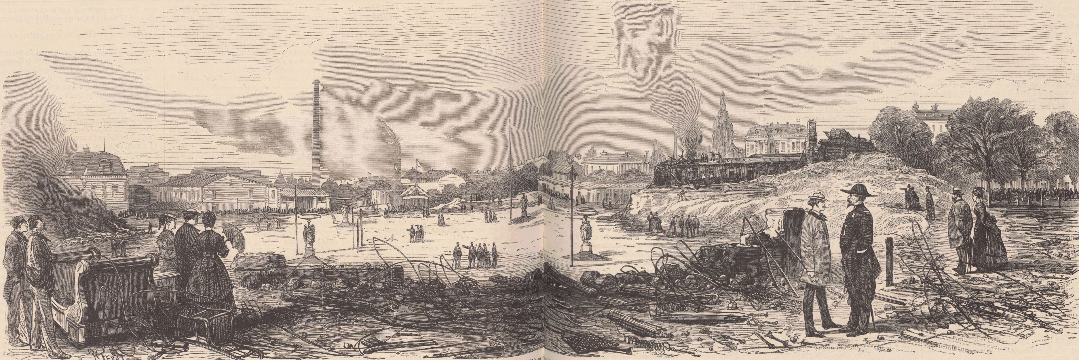 Légende de la gravure : « PARIS. — Aspect général de l'incendie de l'Hippodrome. — Vue prise le lendemain de l'incendie. » Tout ce qui reste de l'Hippodrome après son incendie en 1869. Il s'agit ici de la place d'Eylau, à Paris, rebaptisée par la suite place Victor-Hugo.